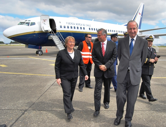 Alcalde Saavedra dio bienvenida a la presidenta Bachelet en su visita a la Región